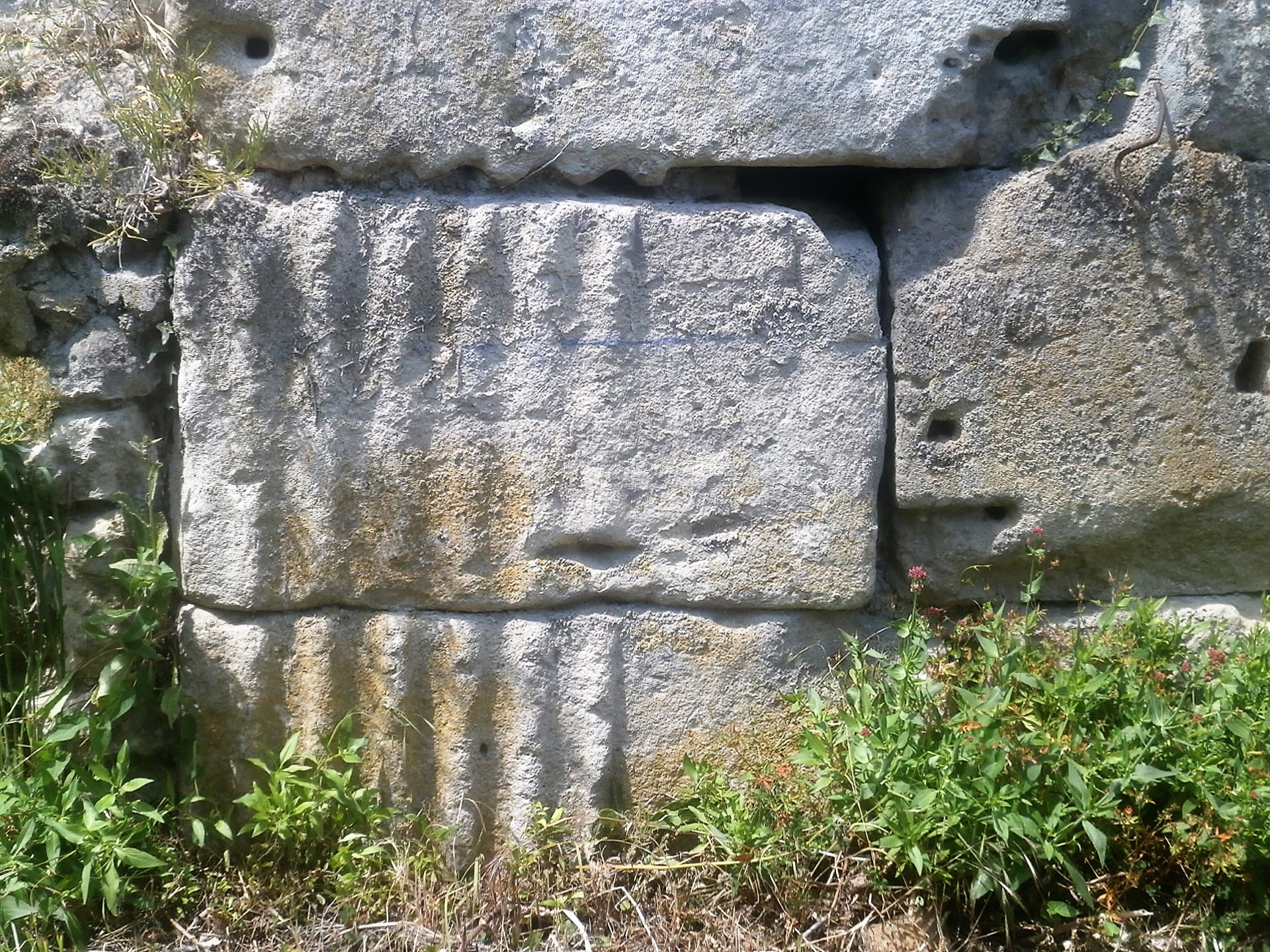 Pilastre antique en remploi d'une réparation tardive à l'enceinte de Tours.